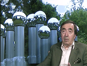 Portrait de Pol Bury